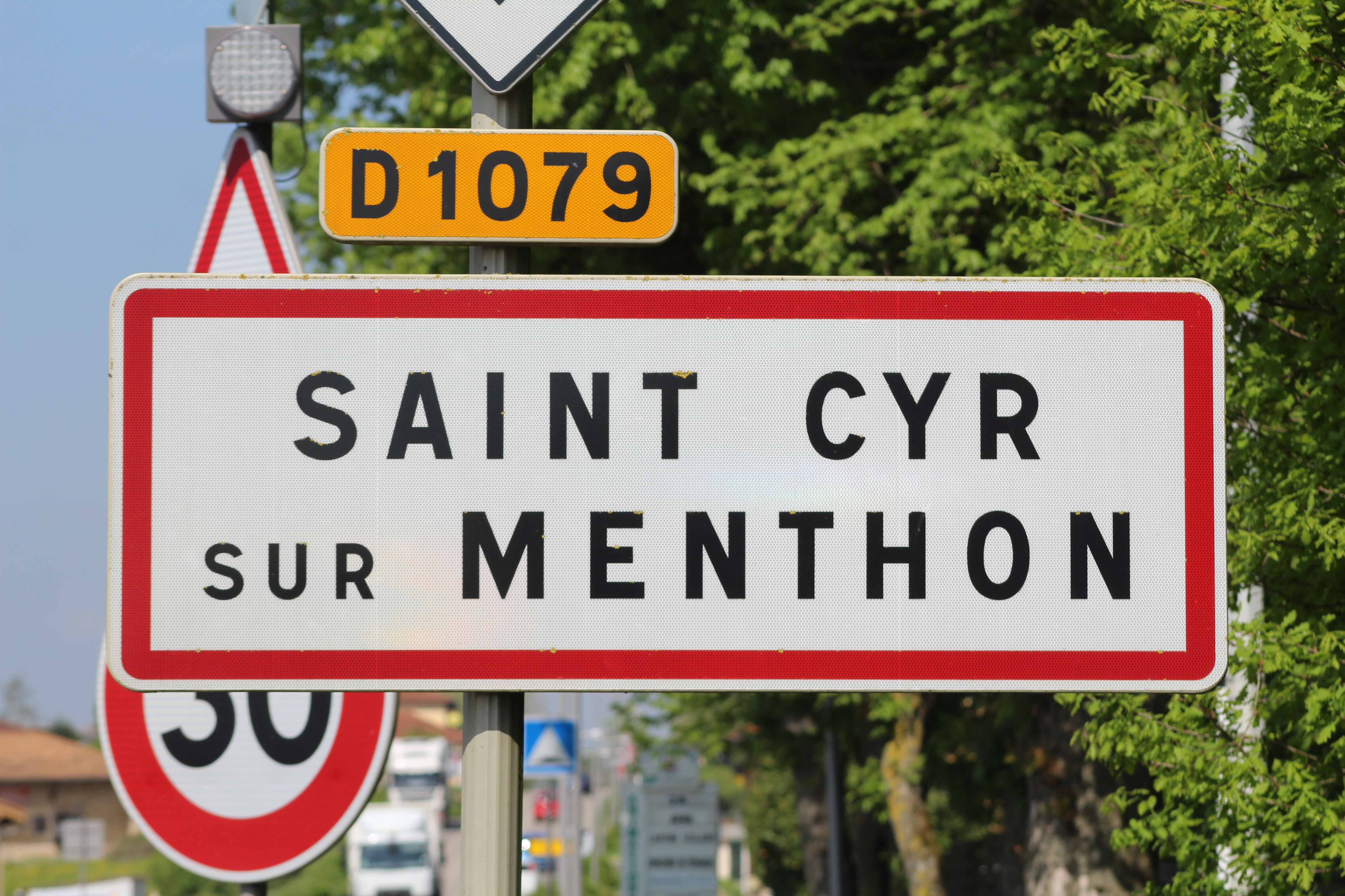 Panneau d'entrée dans Saint-Cyr-sur-Menthon.